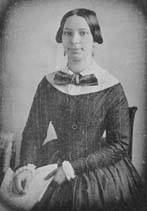 Fanny Hünerwadel, schweizerische Komponistin